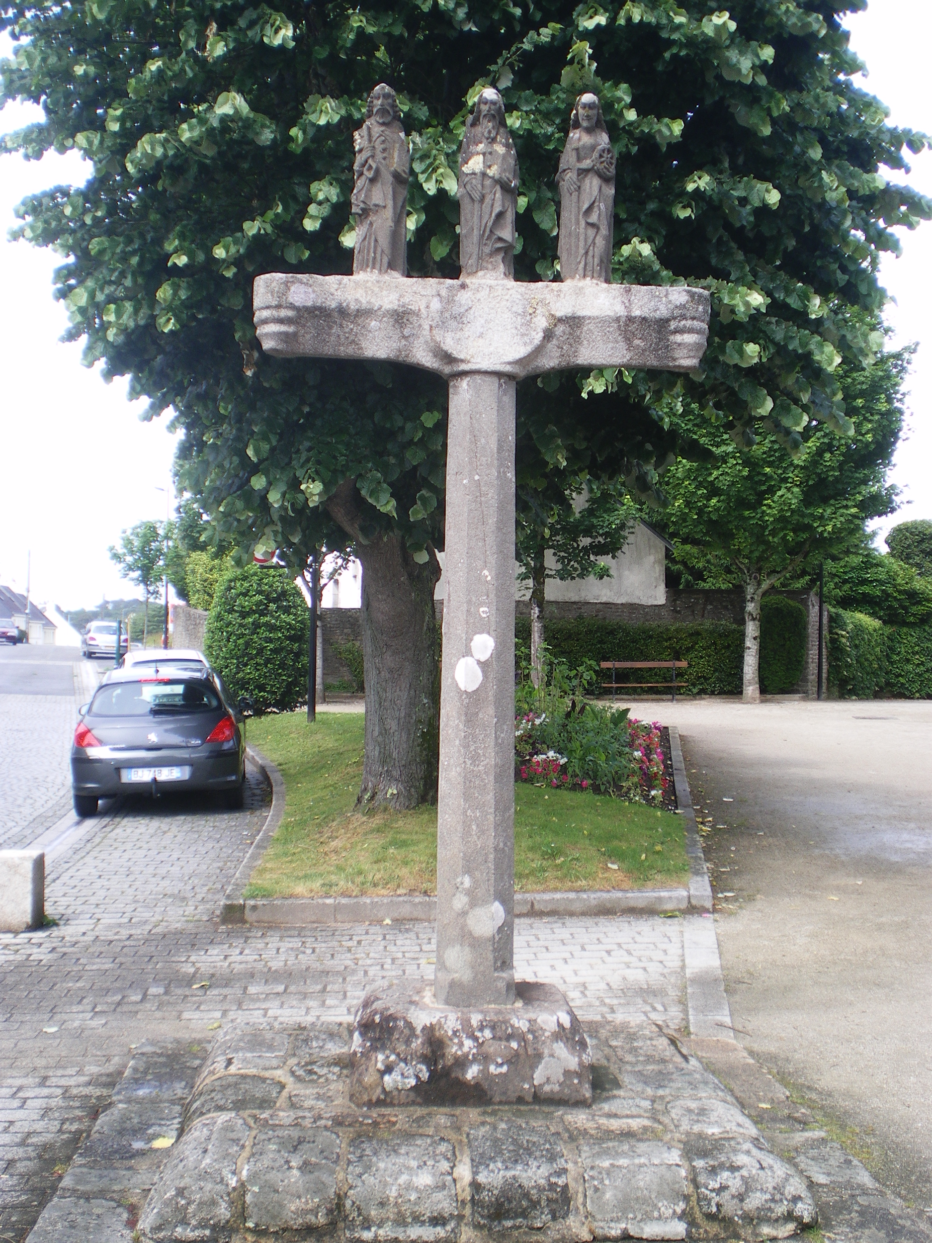 Calvaire de Quéven. Les personnages sculptés sont attribués à Roland Doré (avant 1660). Il comprenait autrefois deux travées supportant au total seize personnages, dos à dos. Seul cinq ont été préservés, les autres ont été détruit lors des bombardements du 7 au 18 août 1944.